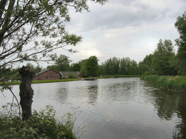 Zoetermeerse Noord-Aa. Eigen foto Mark Voorendt, mei 2005. Afgebeeld is de oorspronkelijke Noord-Aa, een veenmeertje ten noorden van het huidige recreatiegebied "Noord-Aa", dat hoort bij de Zoetermeerse Plas.